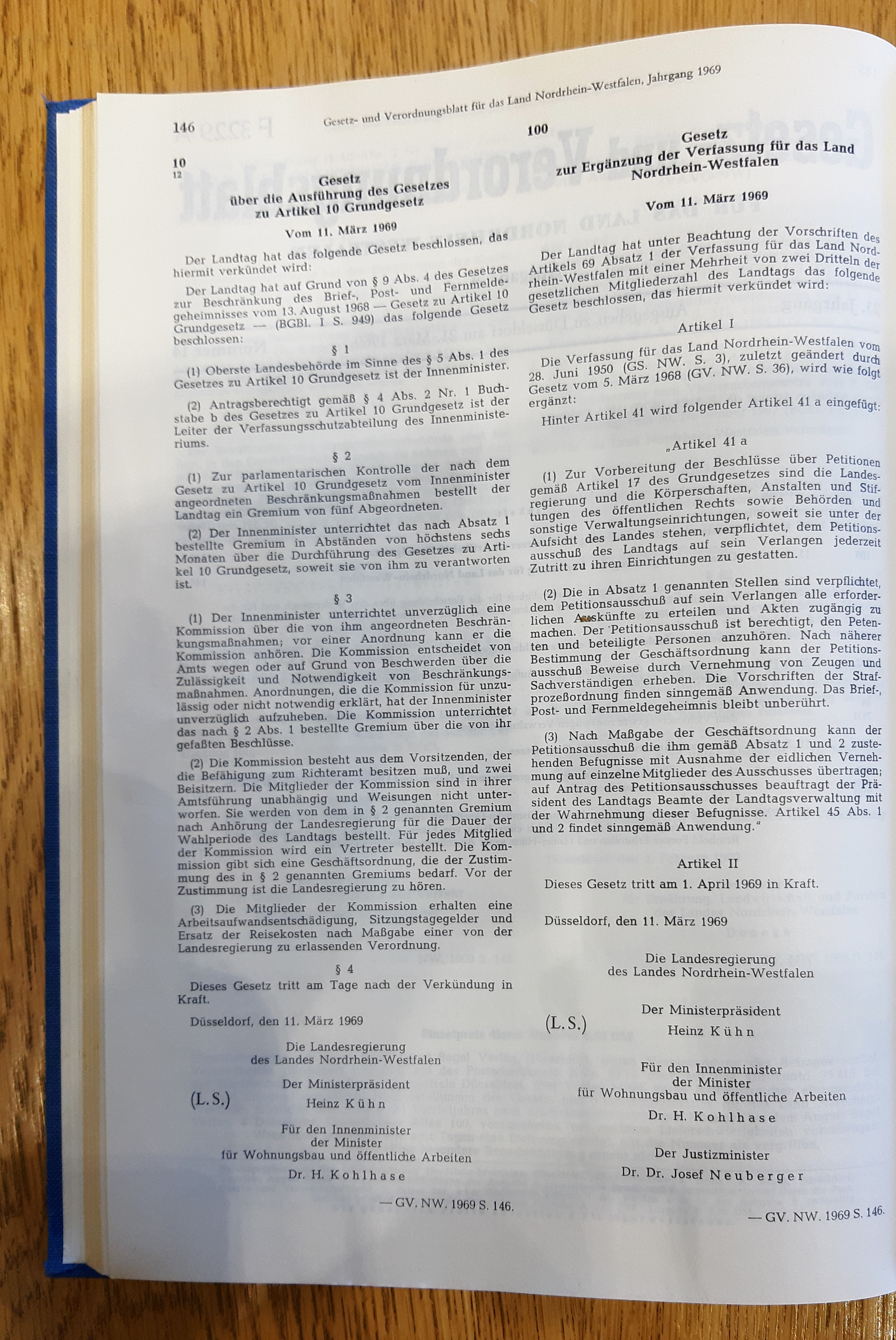 Artikel 41a der Landesverfassung NRW